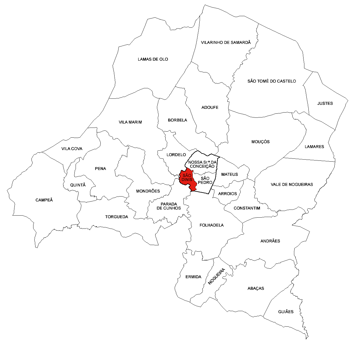 Freguesia de São Dinis (concelho de Vila Real)